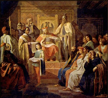 Josef Matyýš Trenkwald - Karel IV. zakládá pražskou universitu. Arcibiskup Arnošt z Pardubic předčítá zakládací listinu v přítomnosti zástupců všech čtyř fakult